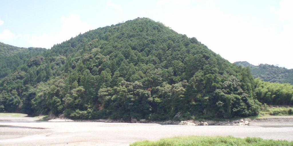 備崎丘陵。和歌山県田辺市本宮町内、熊野川右岸より撮影。